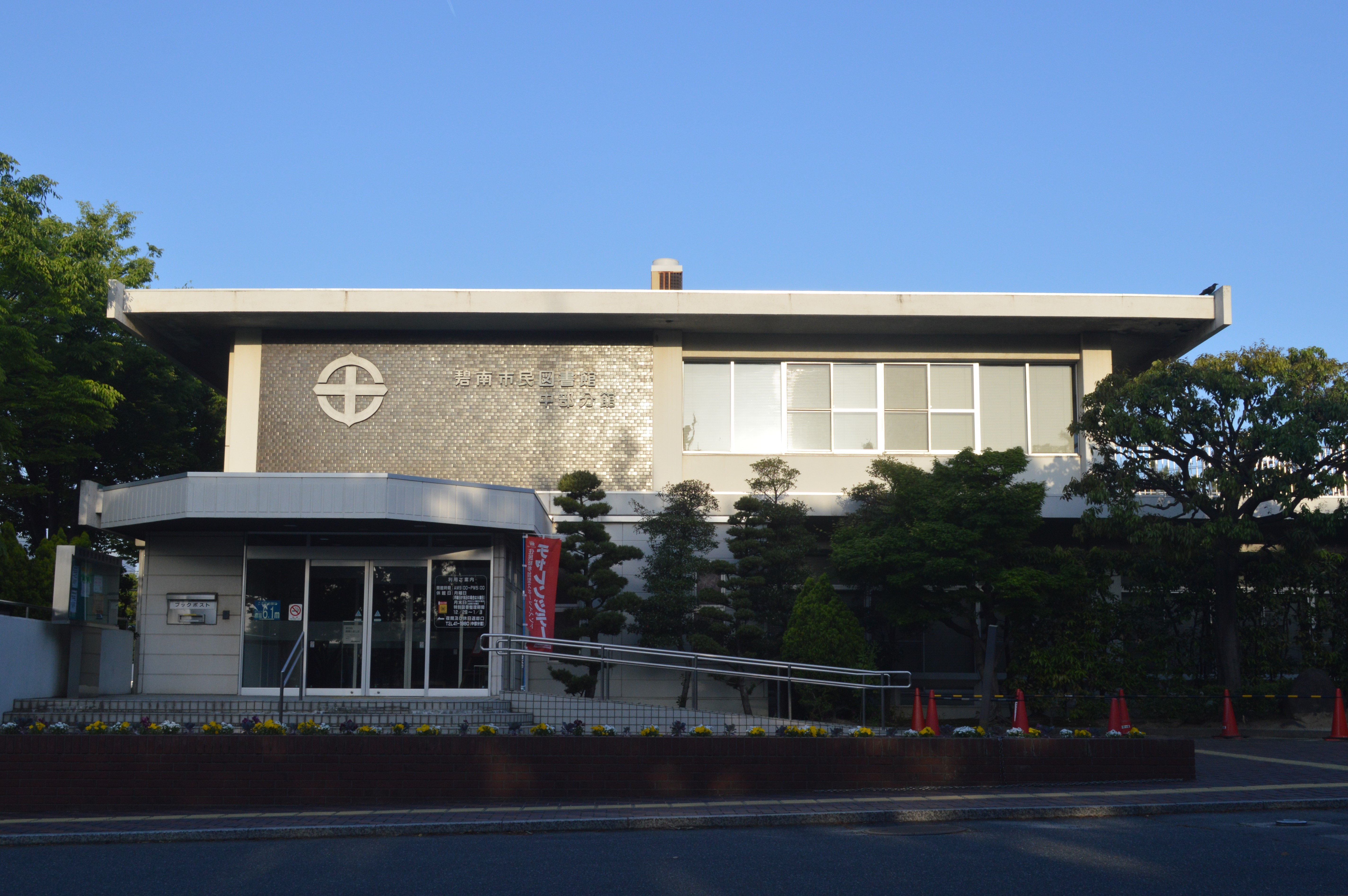 愛知県碧南市の碧南市民図書館中部分館。